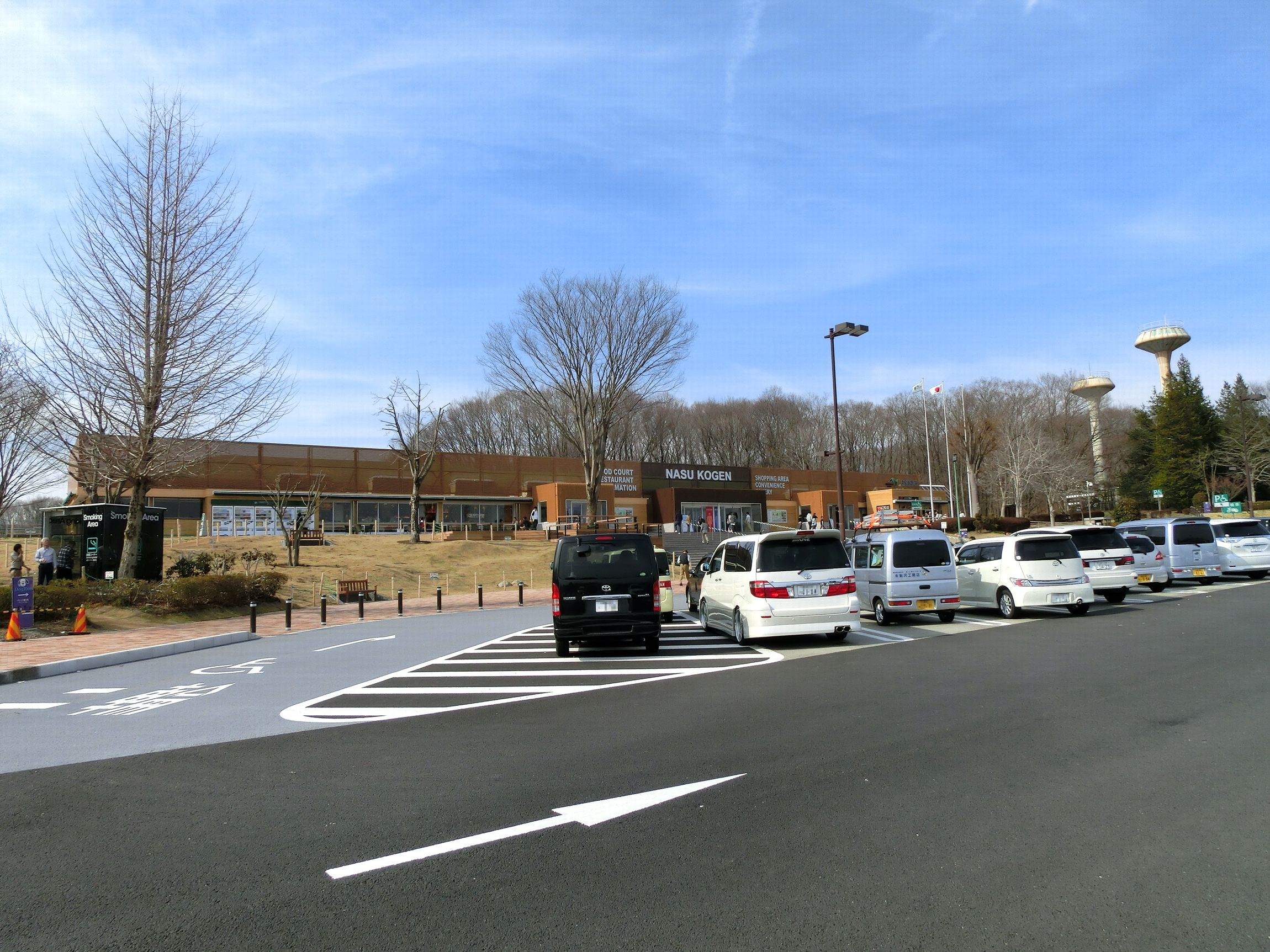 那須高原サービスエリア（下り線）